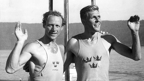 Gert Fredriksson (left) and Sven-Olov Sjödelius 1960